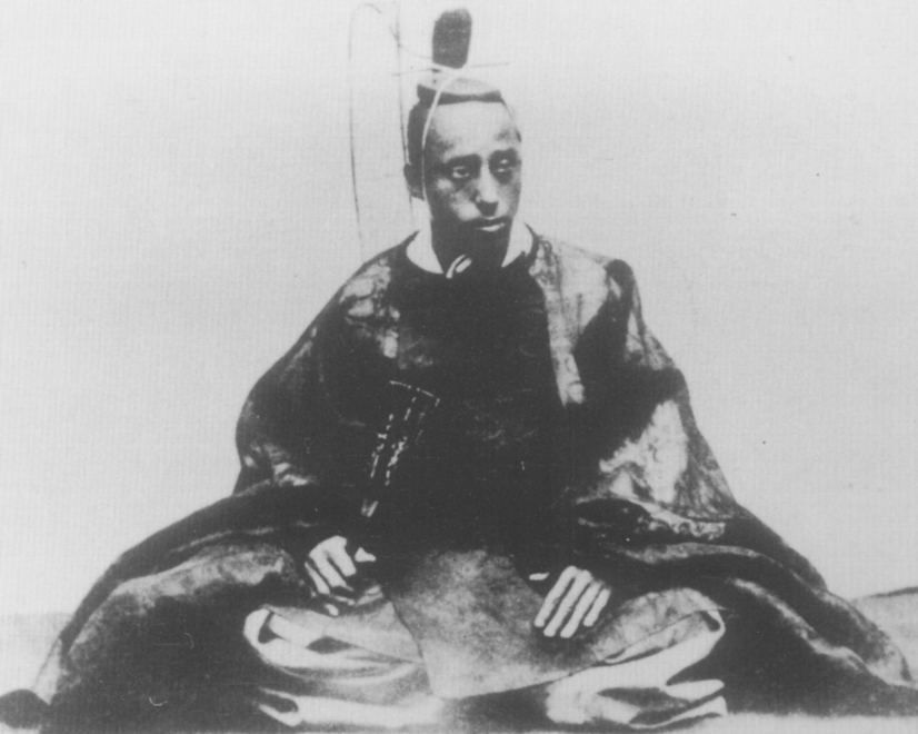 堀直明。Hori Naoakira.